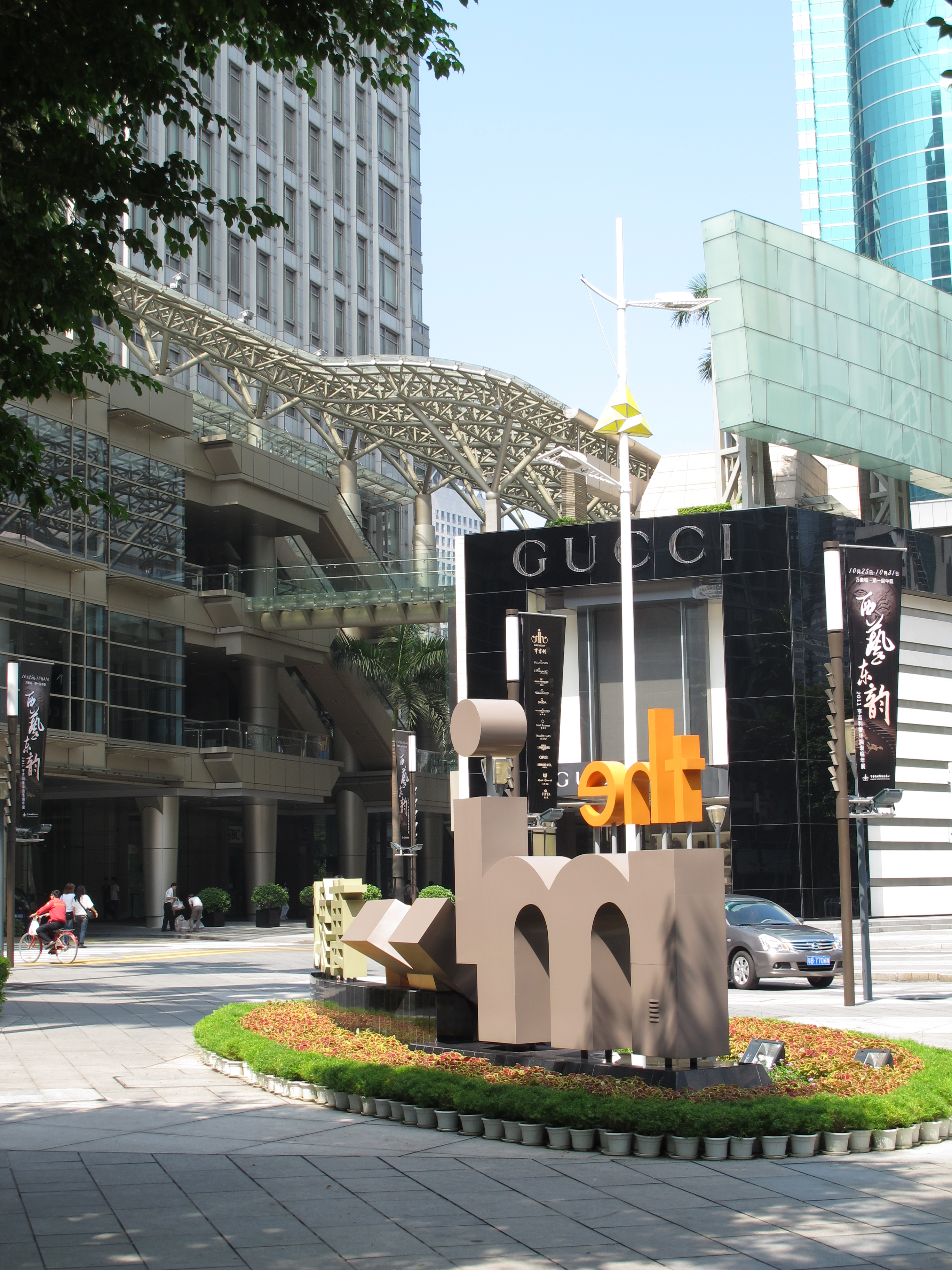 萬象城門前 The Mixc